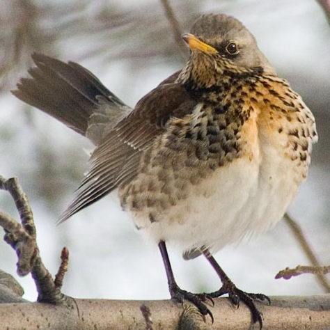 Turdus pilaris Photo taken in Rumia, Poland by Adam Kumiszcza.